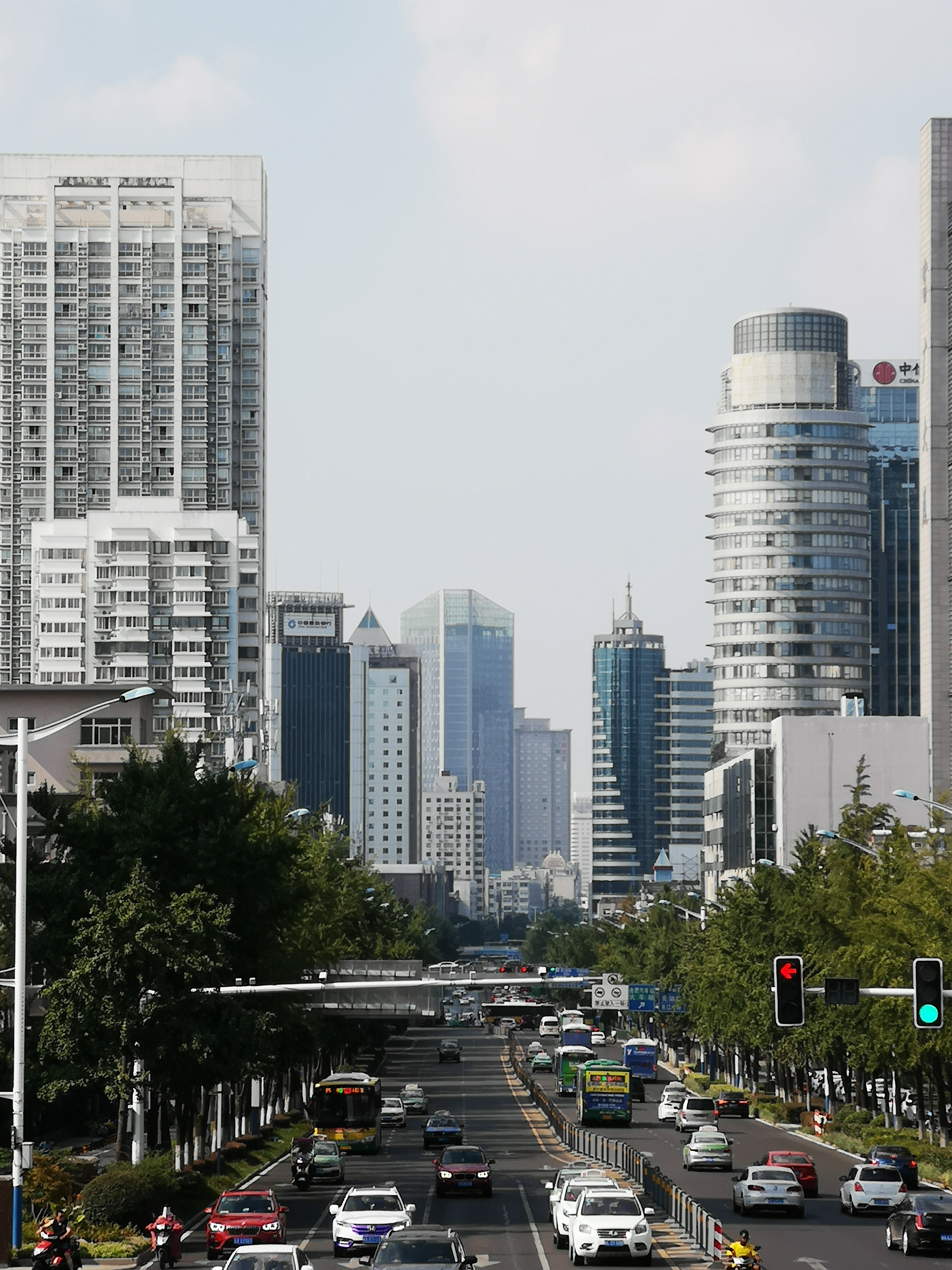 中文（中国大陆）: 合肥市徽州大道北段